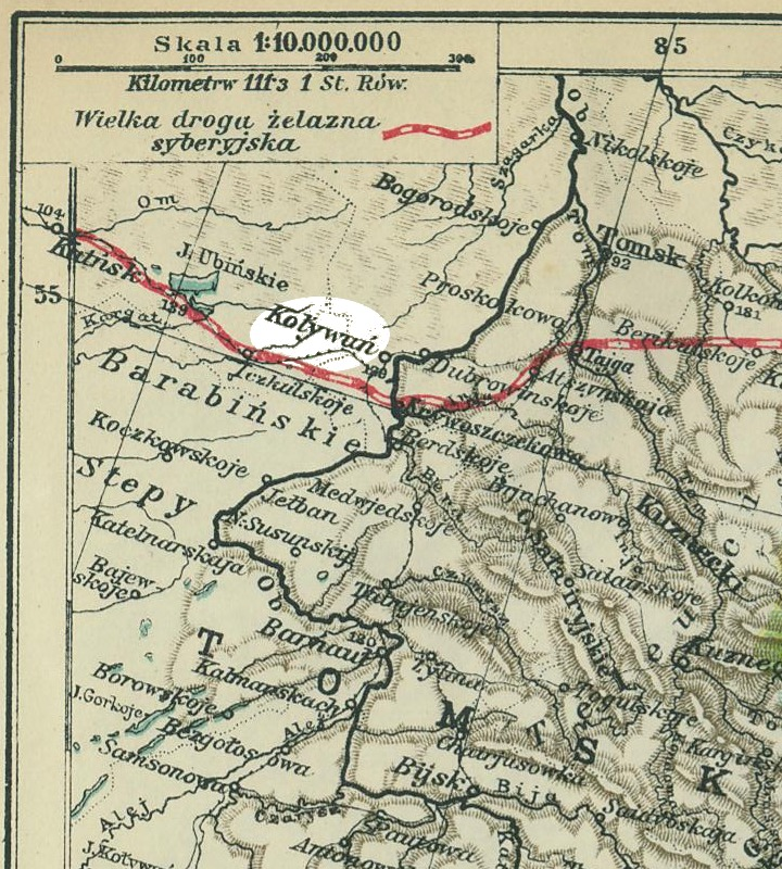 Fragment mapy Syberii z 1903 roku z zaznaczonym miastem Koływań